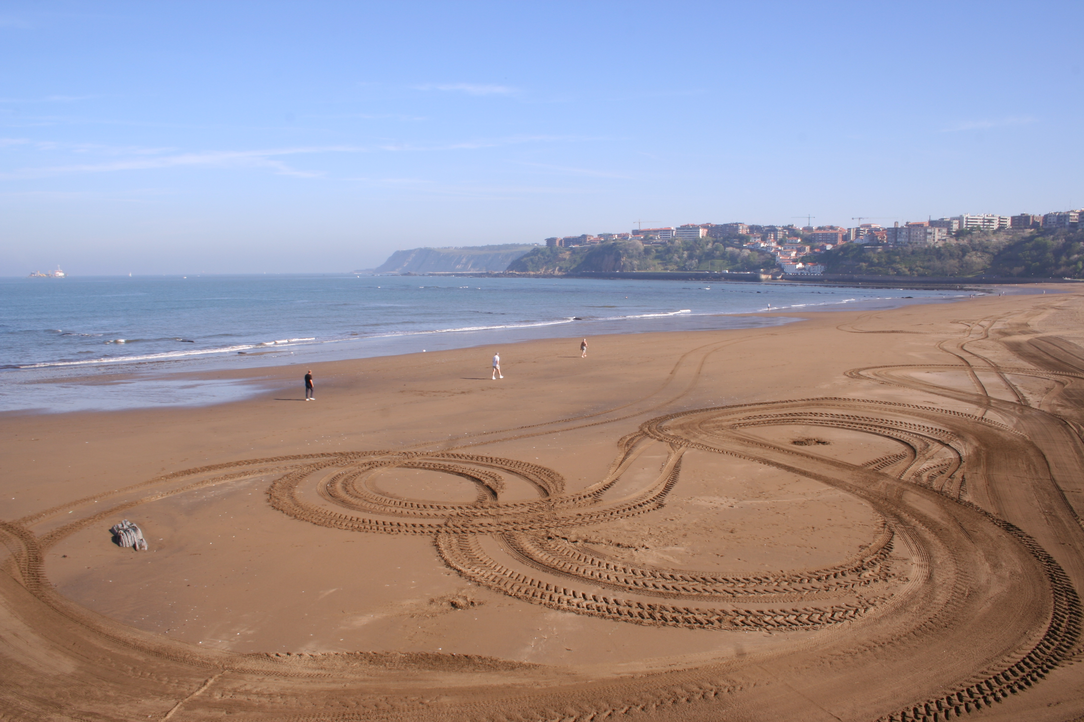 Ereagako hondartza, Getxon. Ereaga beach in Getxo.